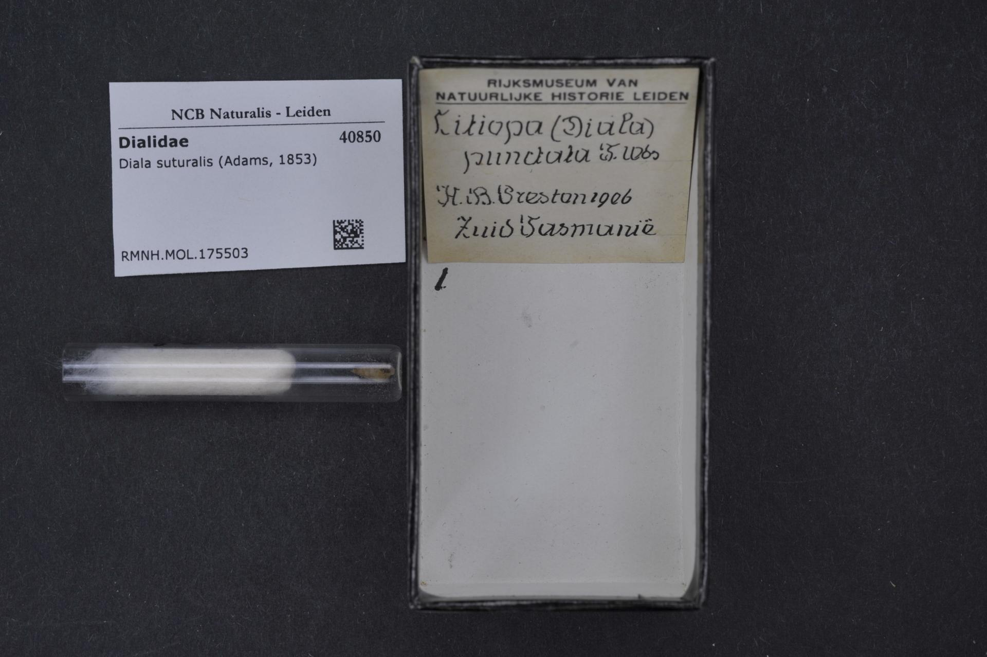 Diala suturalis (Adams, 1853)